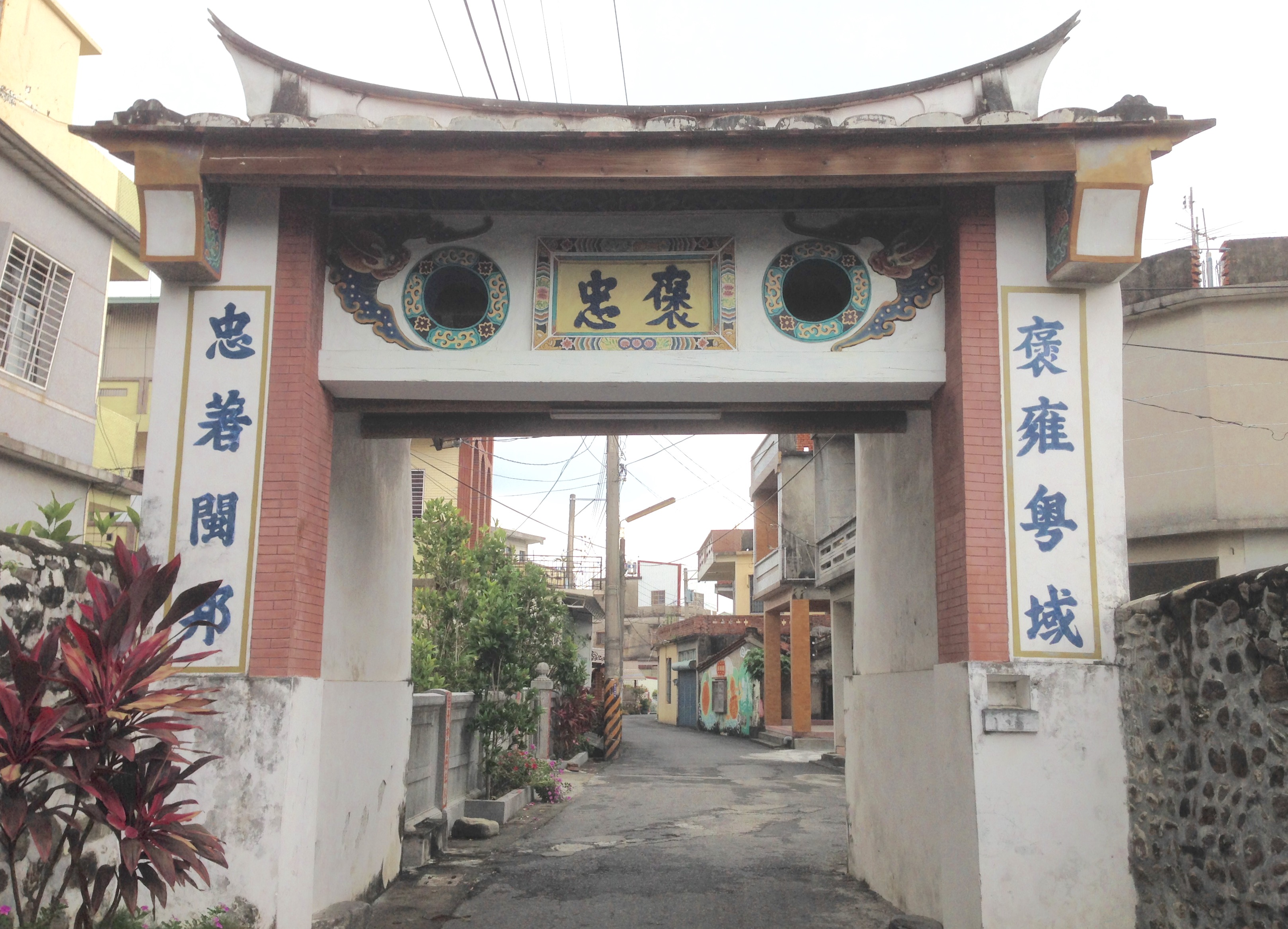 佳冬庄西隘門